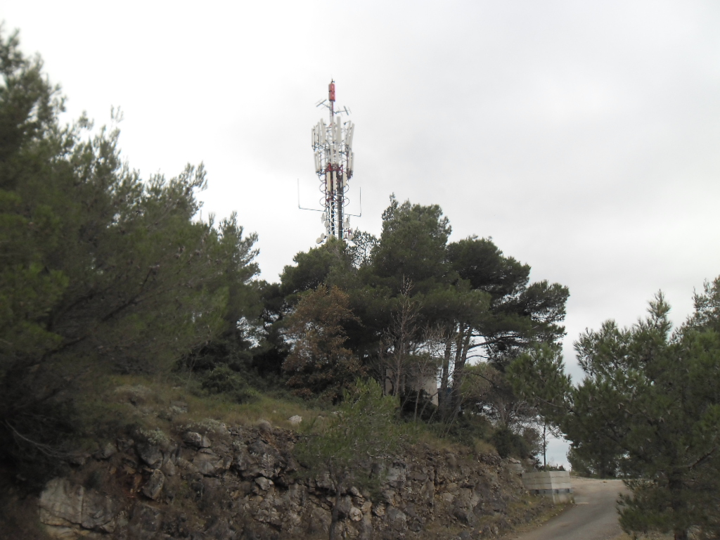 vrh Petke (Lapad)